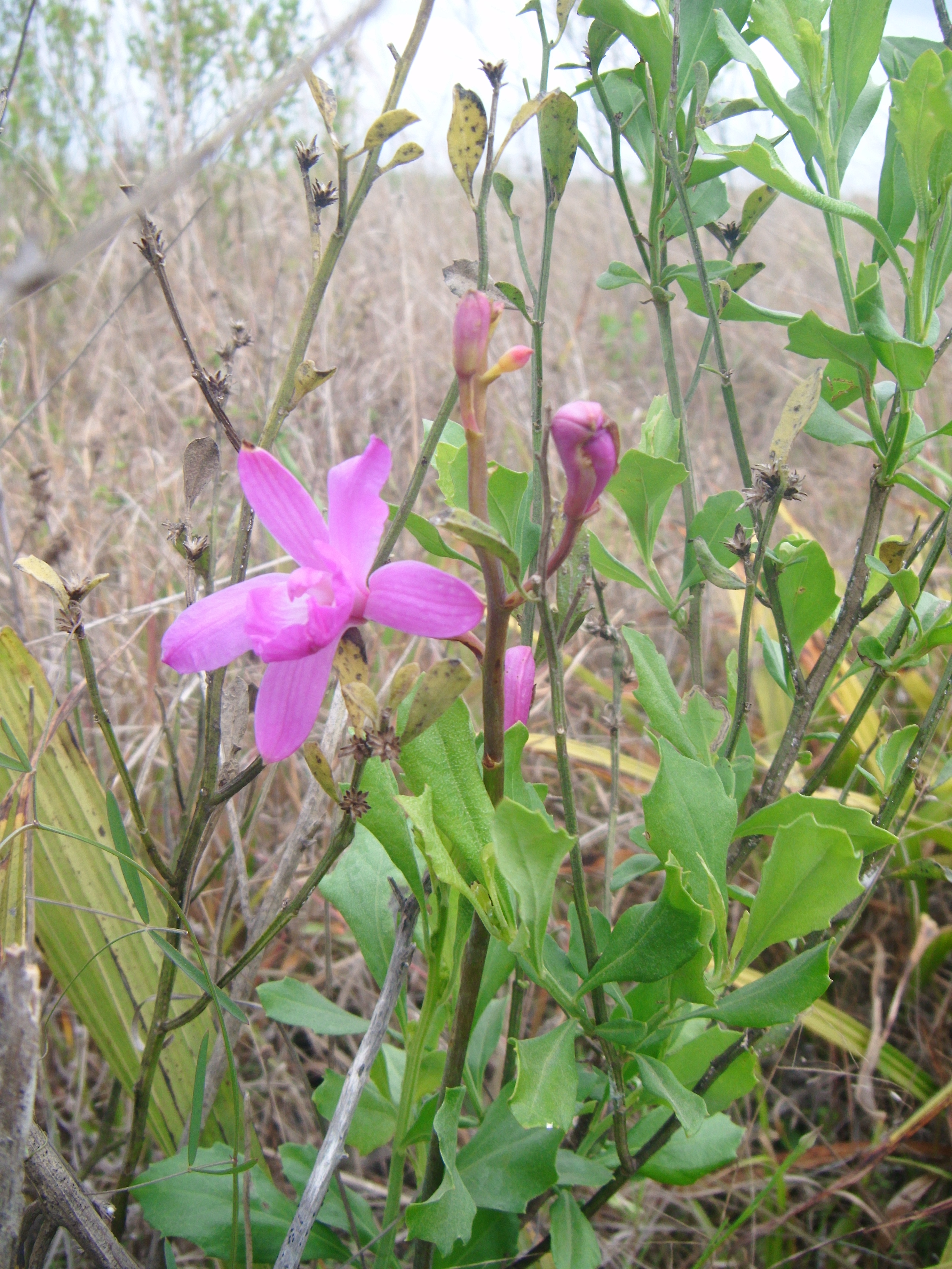 Bletia Patula (2),NPSPhoto, S.Diaz, 2013.jpg